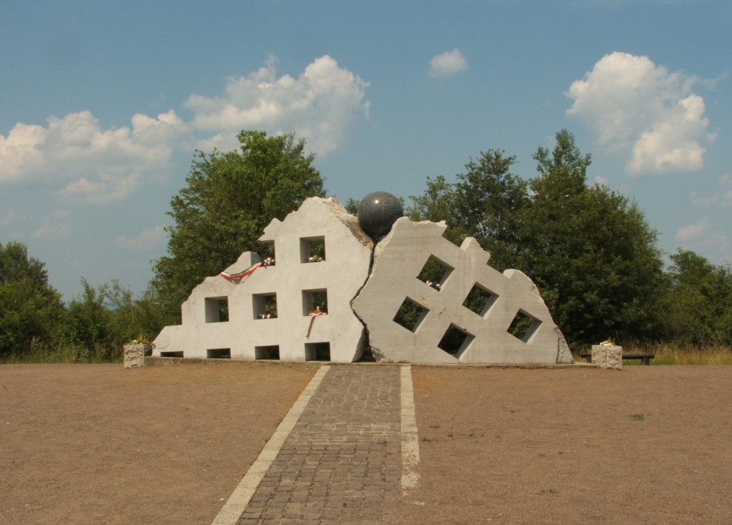 A recski kényszermunkatábor emlékműve. Saját kép.